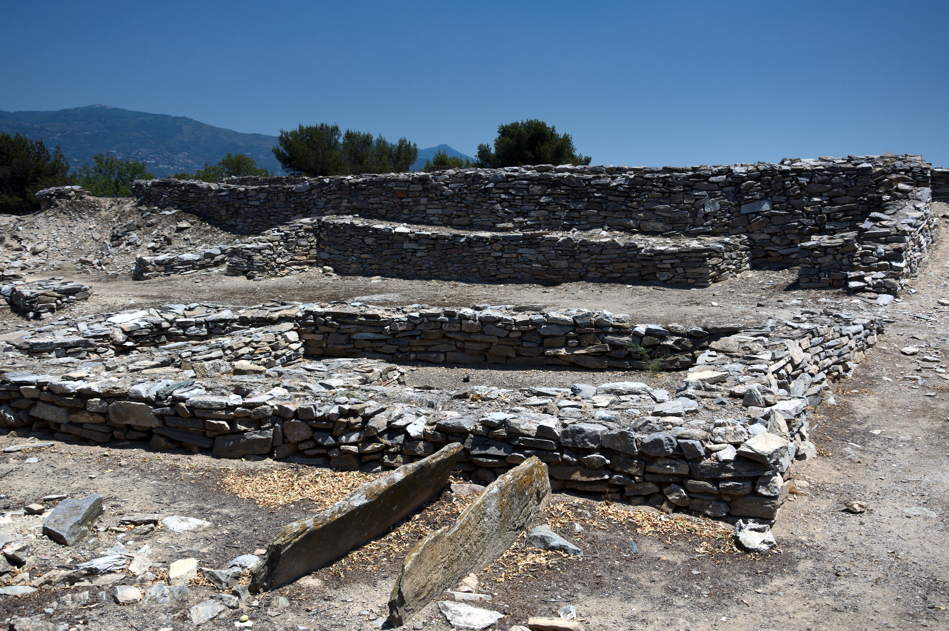 Διμήνι«Διμήνι»